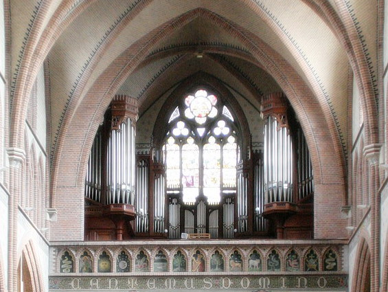 Interieur van de St. Jozefkathedraal te Groningen, met zicht op het orgel